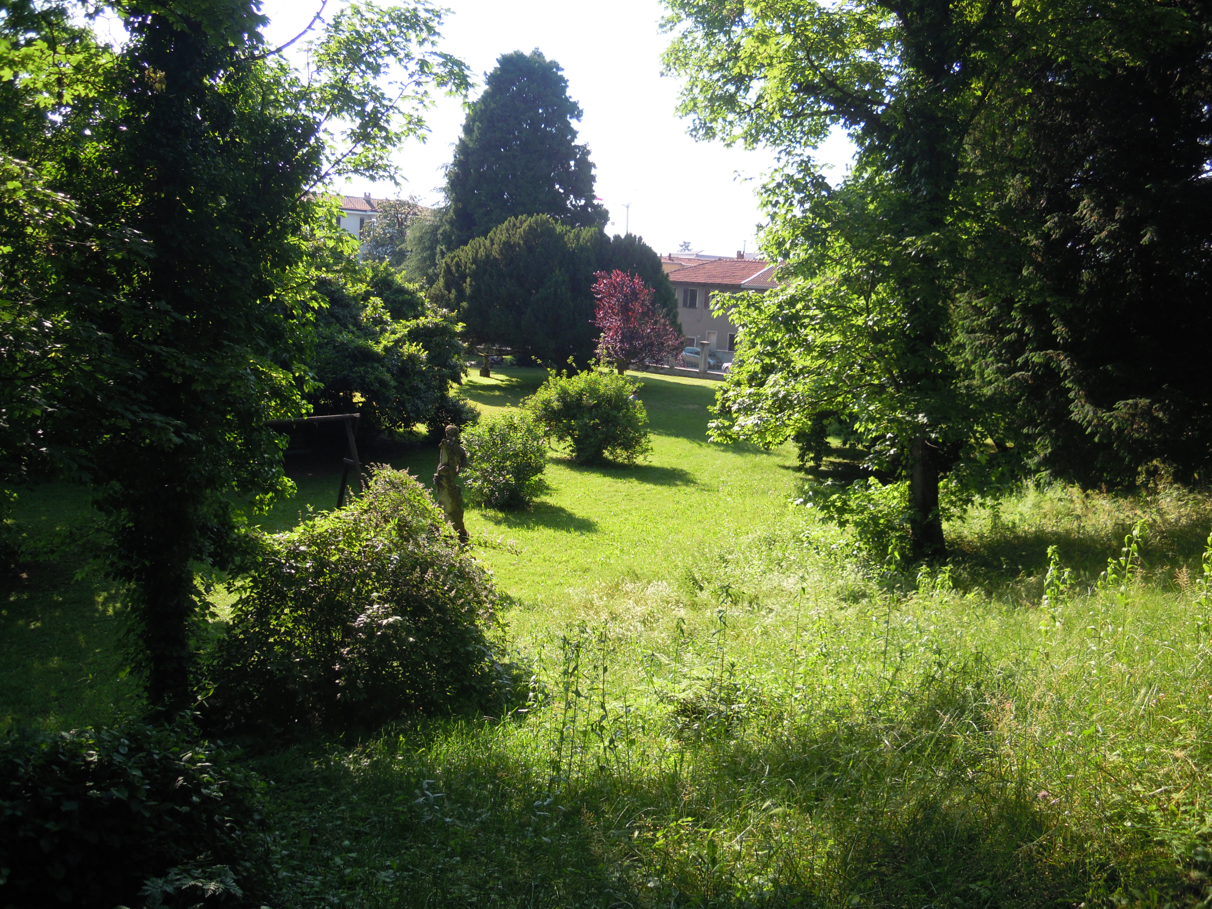 Il parco della Villa Ricci al Montevecchio di Samarate (VA)